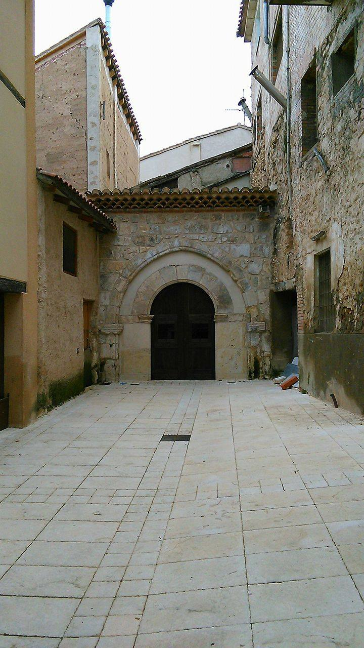 Ermita de San Joaquín, tras su restauración en 2015. Los edificios colaterales constituyeron el Real Hospital de Pobres de Santa Ana. Ademuz